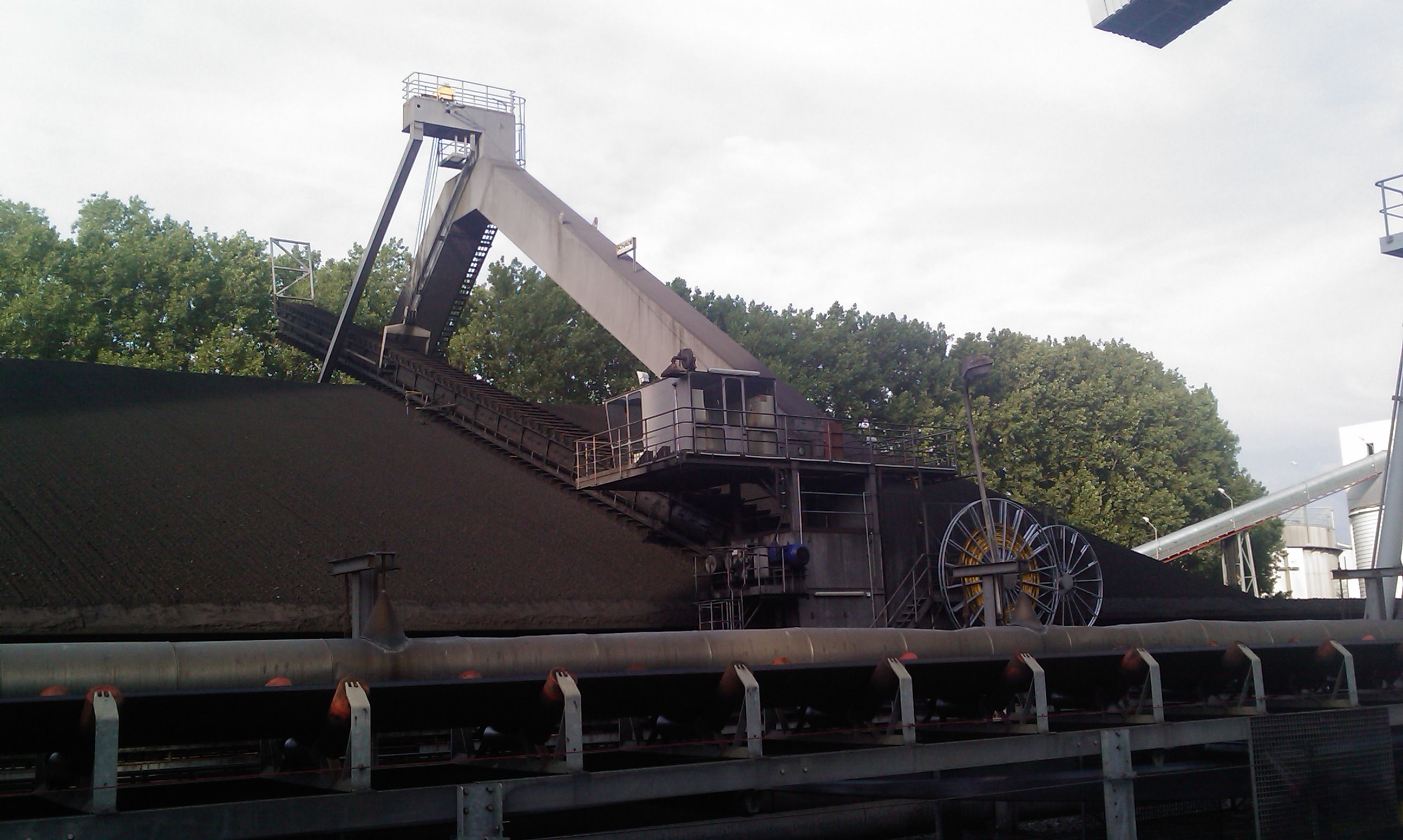 Bande transporteuse de la centrale électrique de Ruien